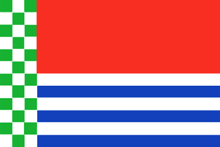 Bandera de Beas de Segura